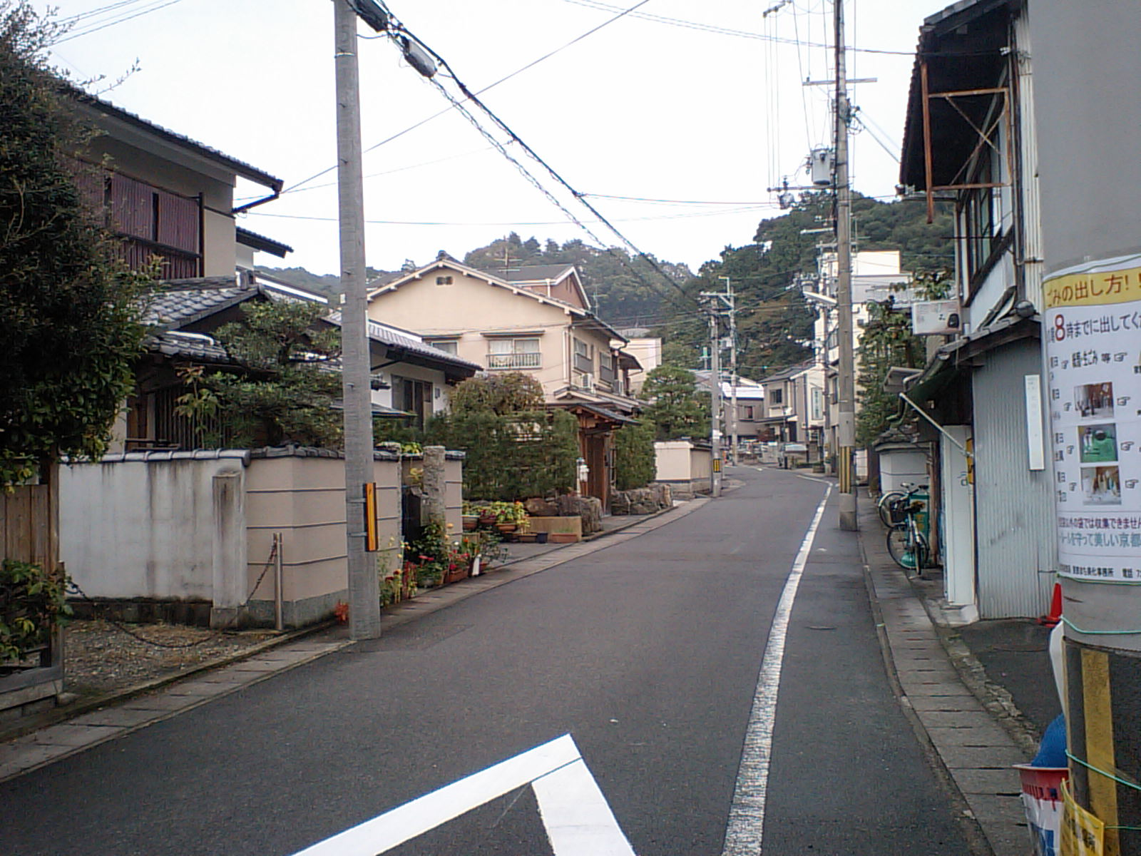 京都市左京区北白川下池田町・・・あたり。志賀越道(山中越、旧街道)沿い。